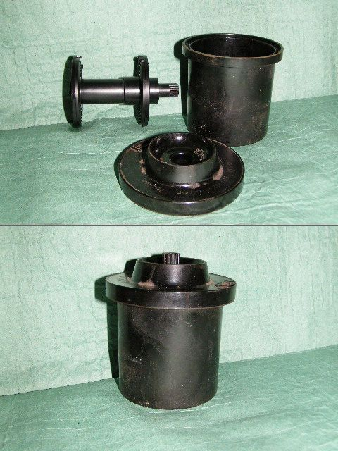 Фотобачок для фотопленки тип 120. СССР, 1980-е годы.